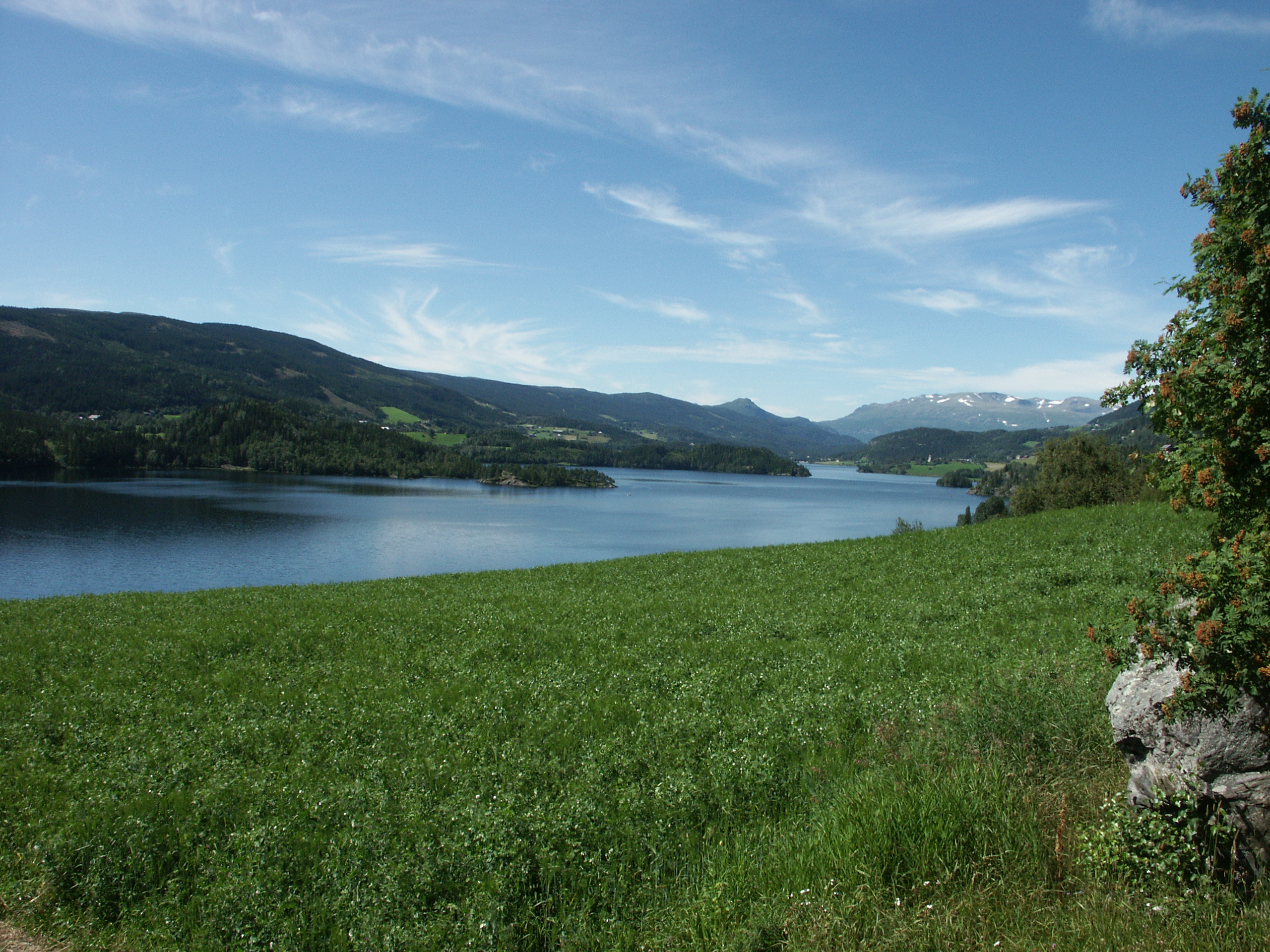 Slidrefjorden